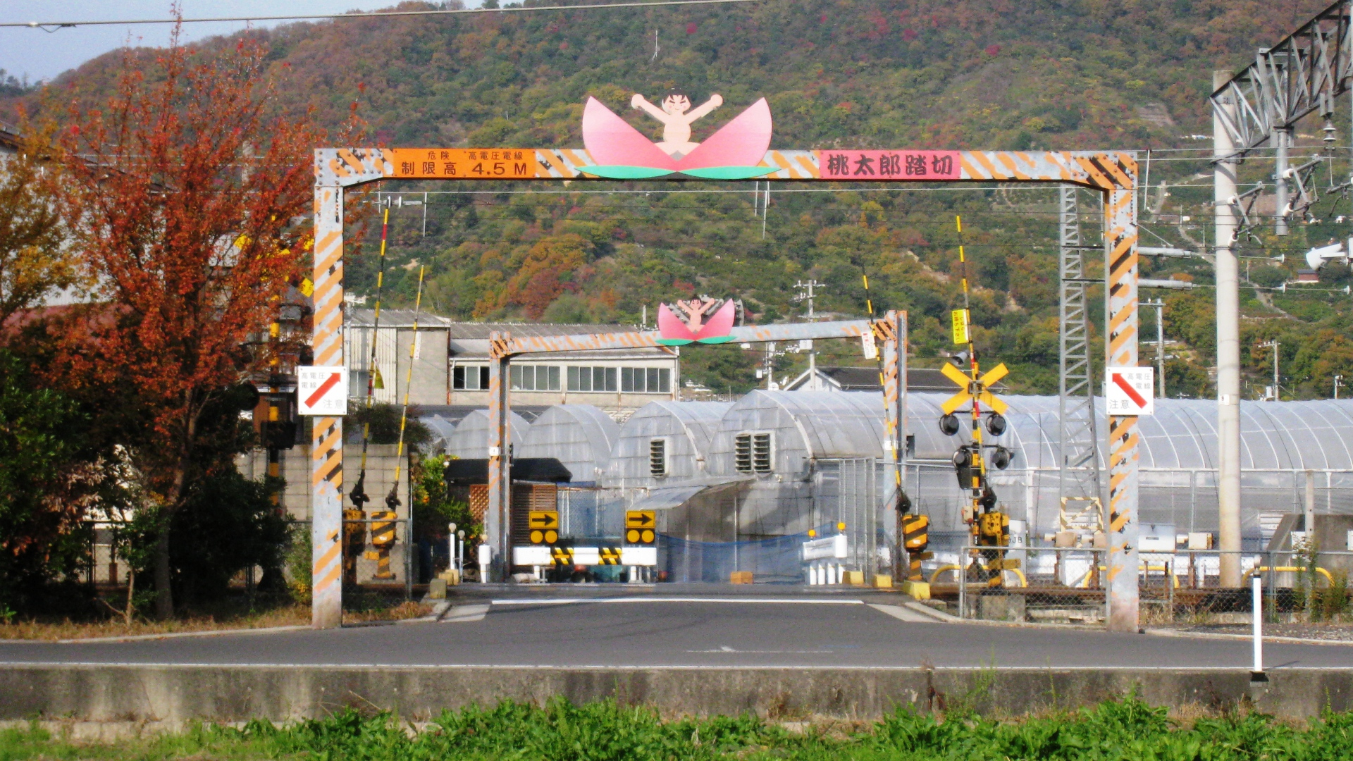 香川県高松市のJR鬼無駅の北側にある「桃太郎踏切」。名前はこのあたりが桃太郎伝説ゆかりの地の一つであることによる。